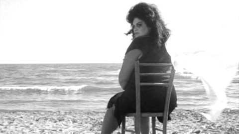 Screenshot del film 8½ (1963)